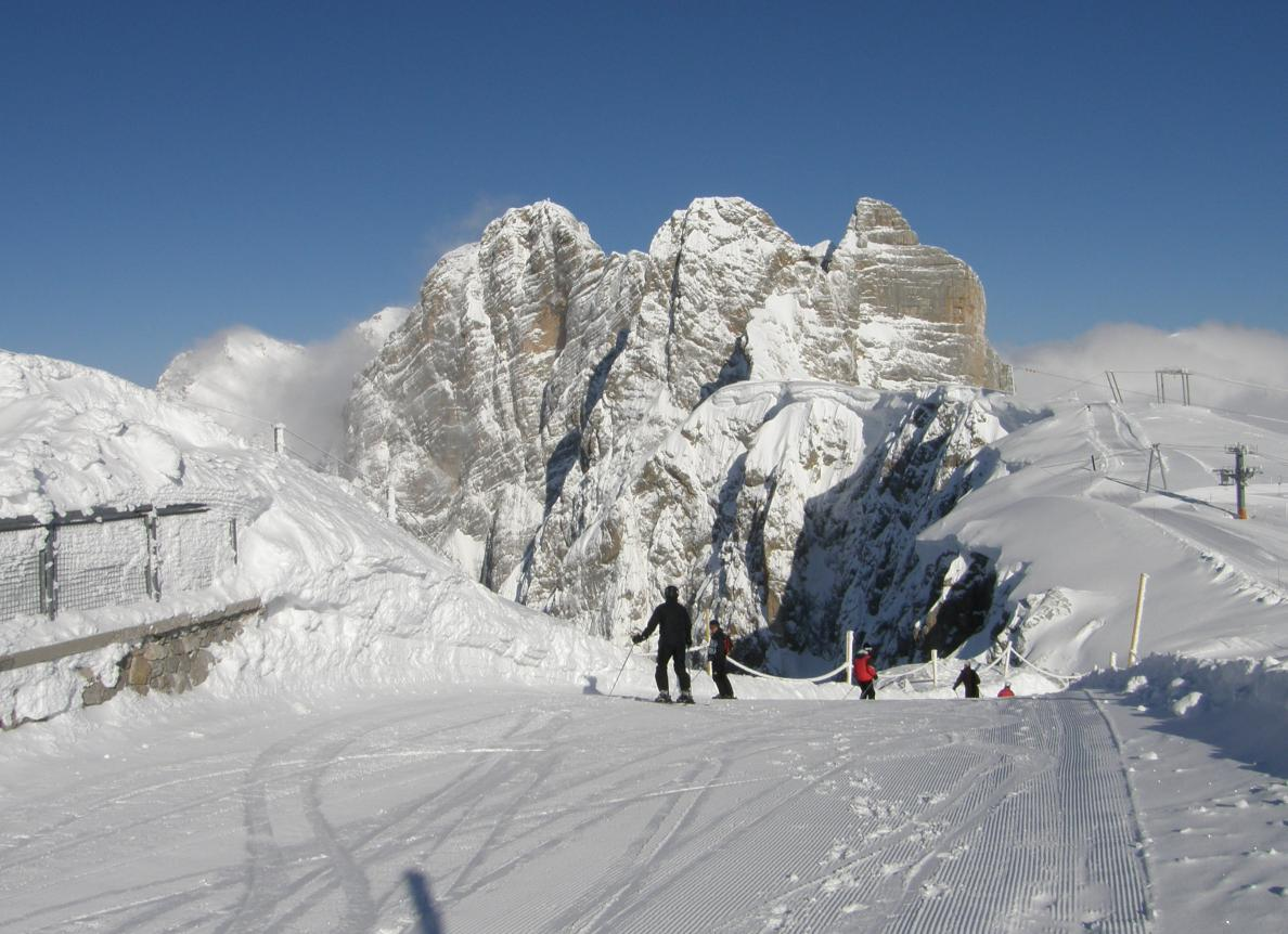 Dachstein - 2995 m